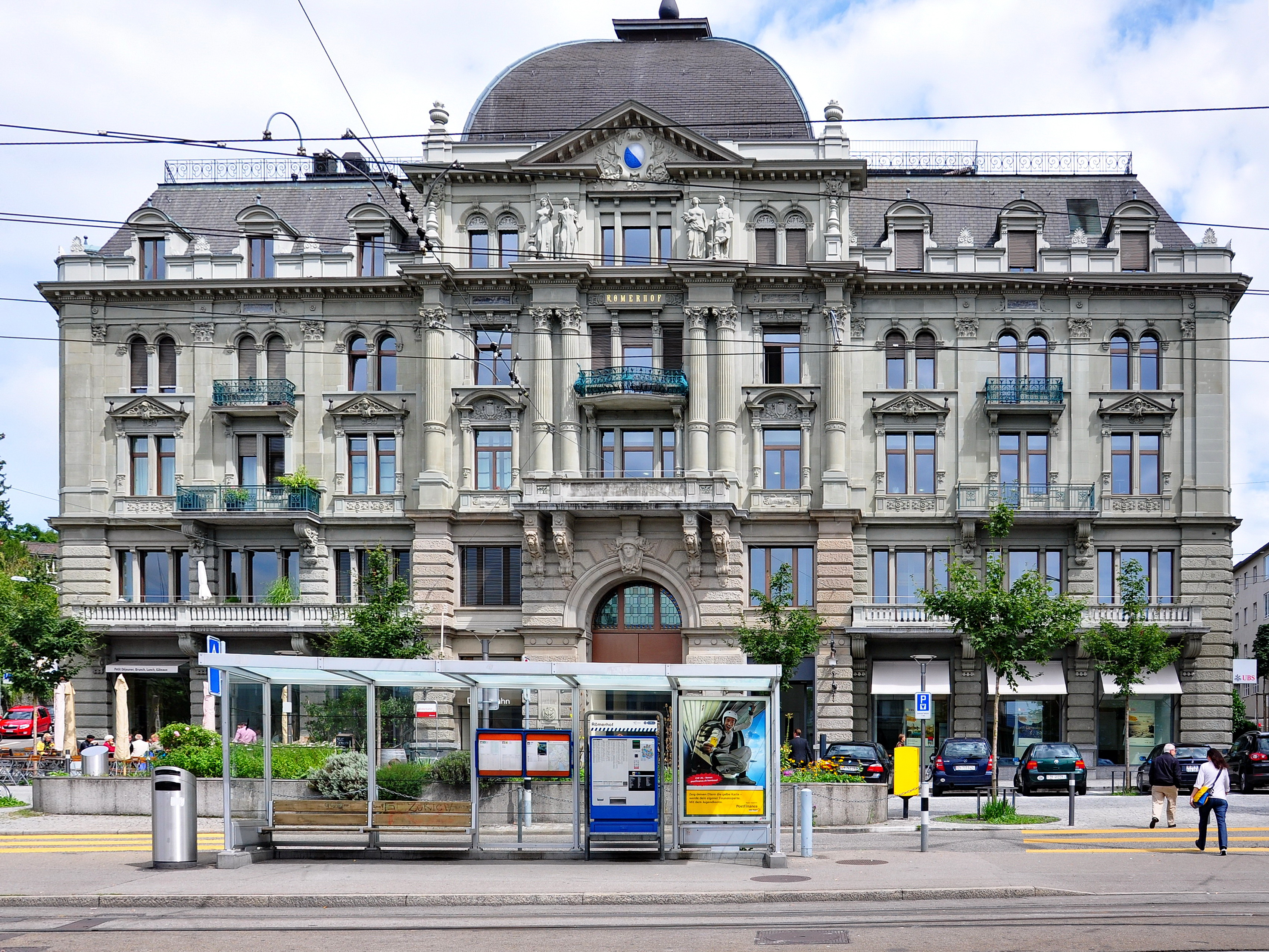 Dolderbahn in Zürich-Römerhof